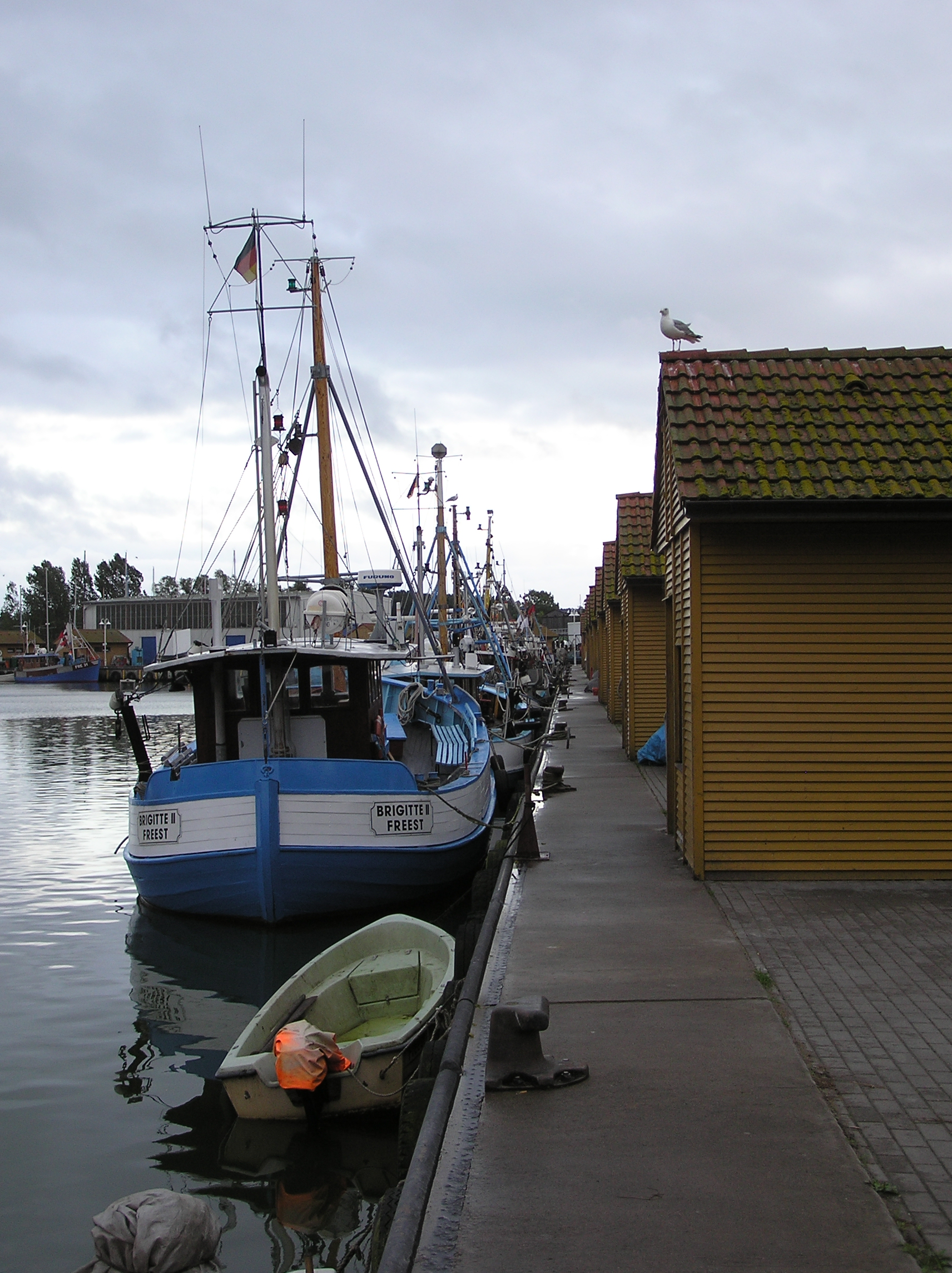 Freest_Fischerhafen